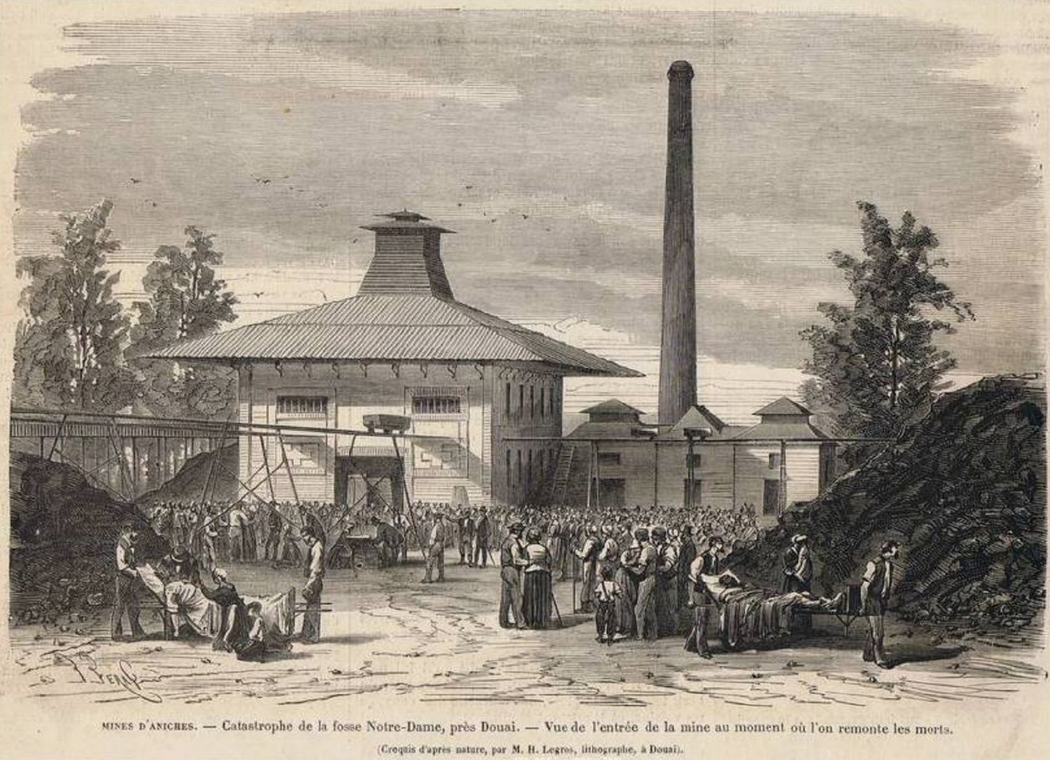 La fosse Notre-Dame de la Compagnie des mines d'Aniche était un charbonnage constitué de deux puits situé à Waziers, Nord, Nord-Pas-de-Calais, France.